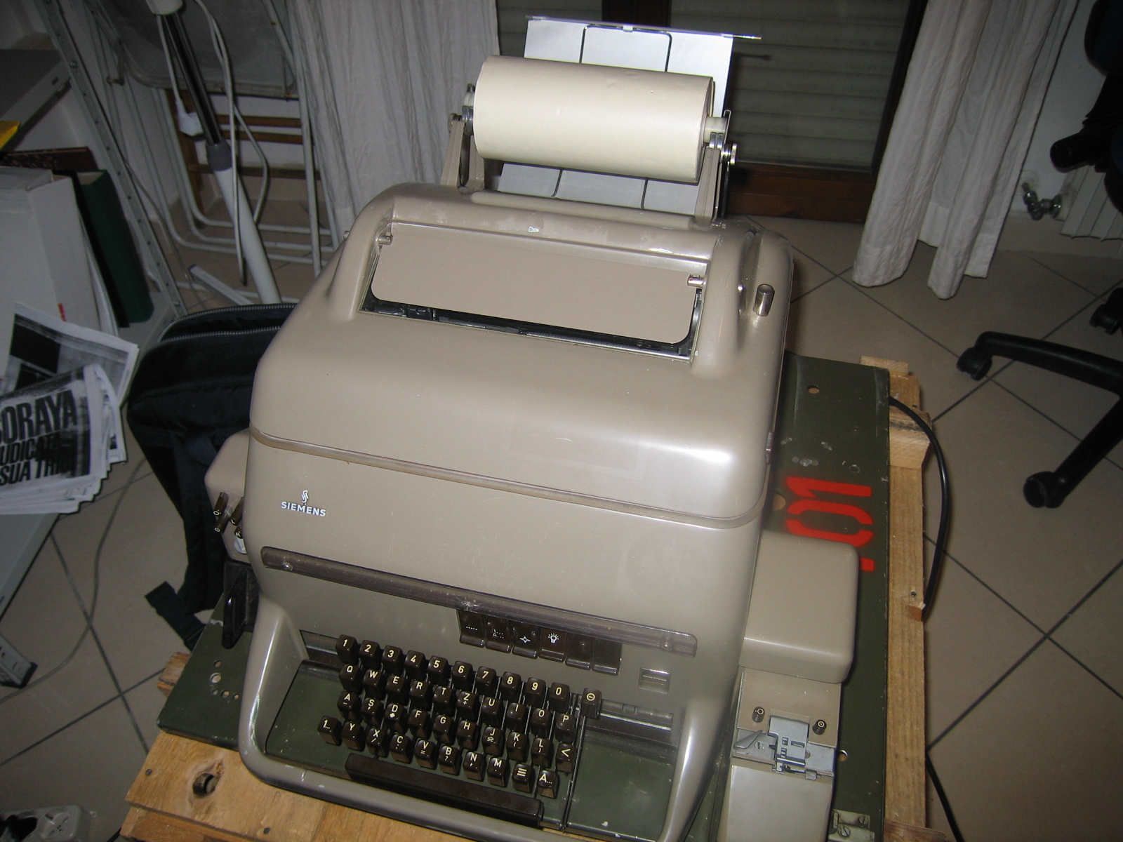 Siemens "Fernscheiber 100" teletype. Front view.